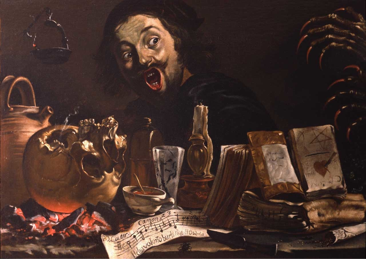 Self-portrait